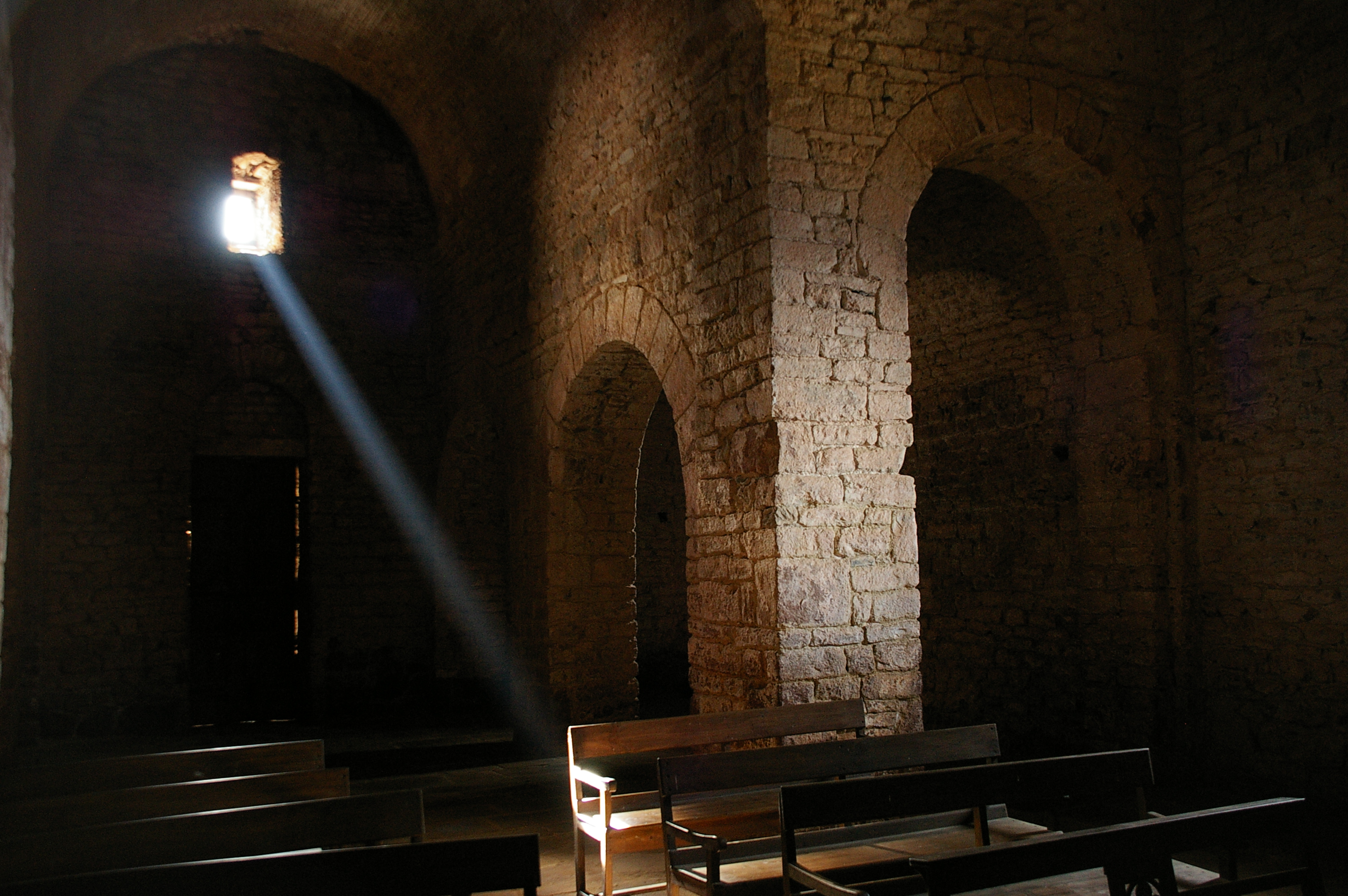 Monestir de Sant Llorenç del Munt (Matadepera)